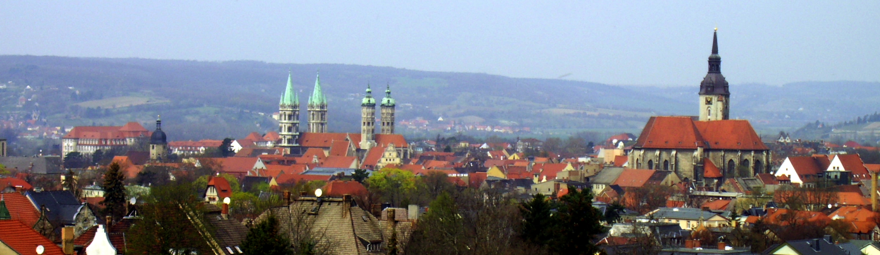 Panorama der Stadt Naumburg (Saale)